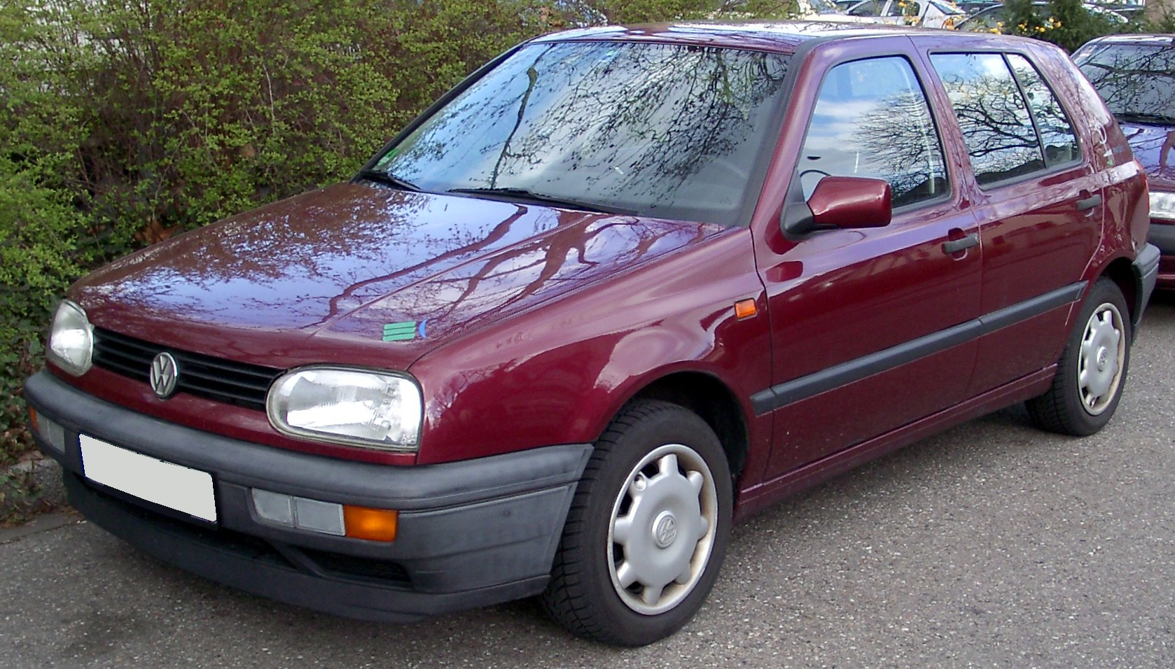 VW Golf III, Sondermodell Pink Floyd